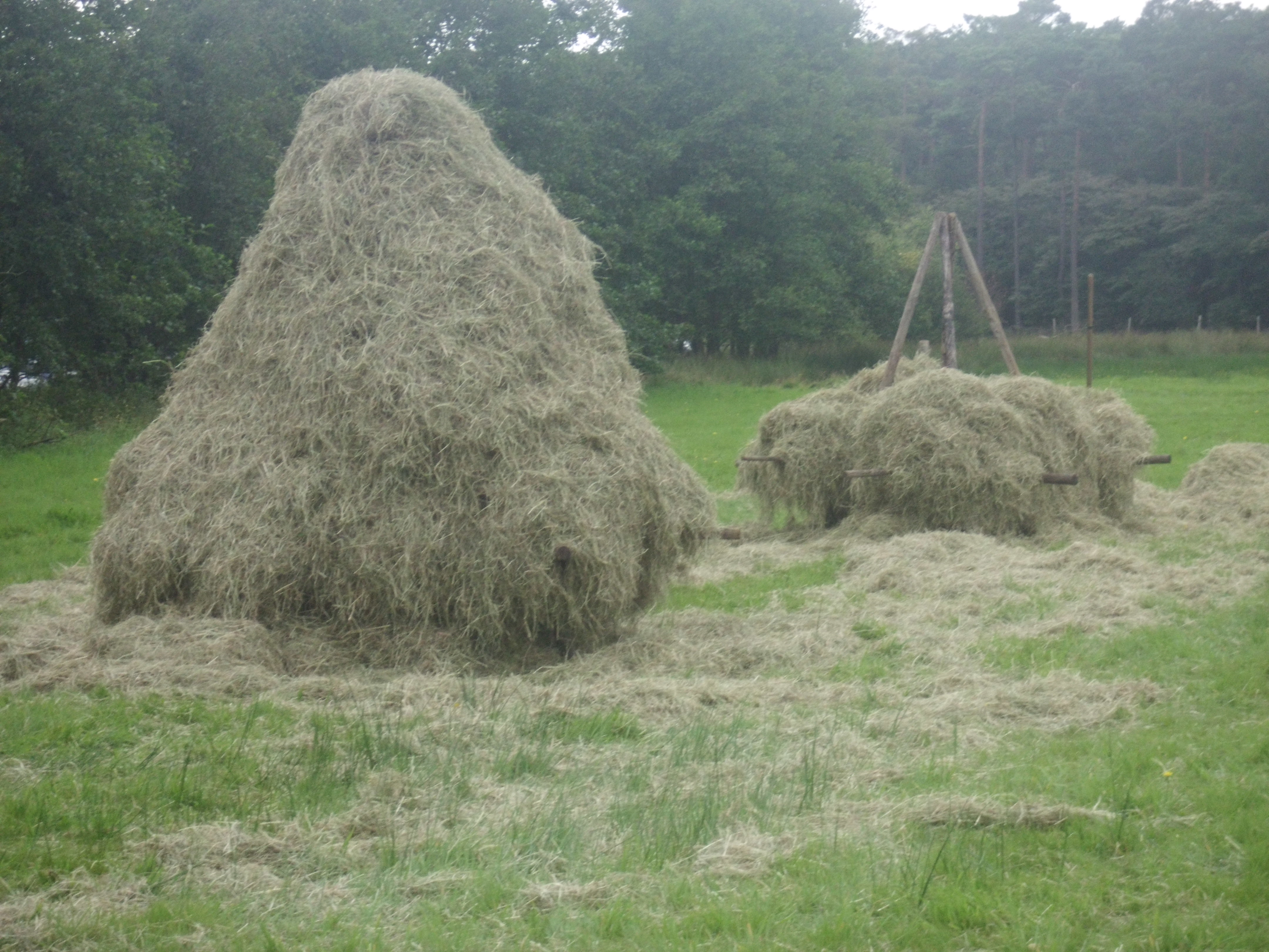 Hooiruiters voor het drogen van hooi op de Oogstdag in De Treek (Leusden)